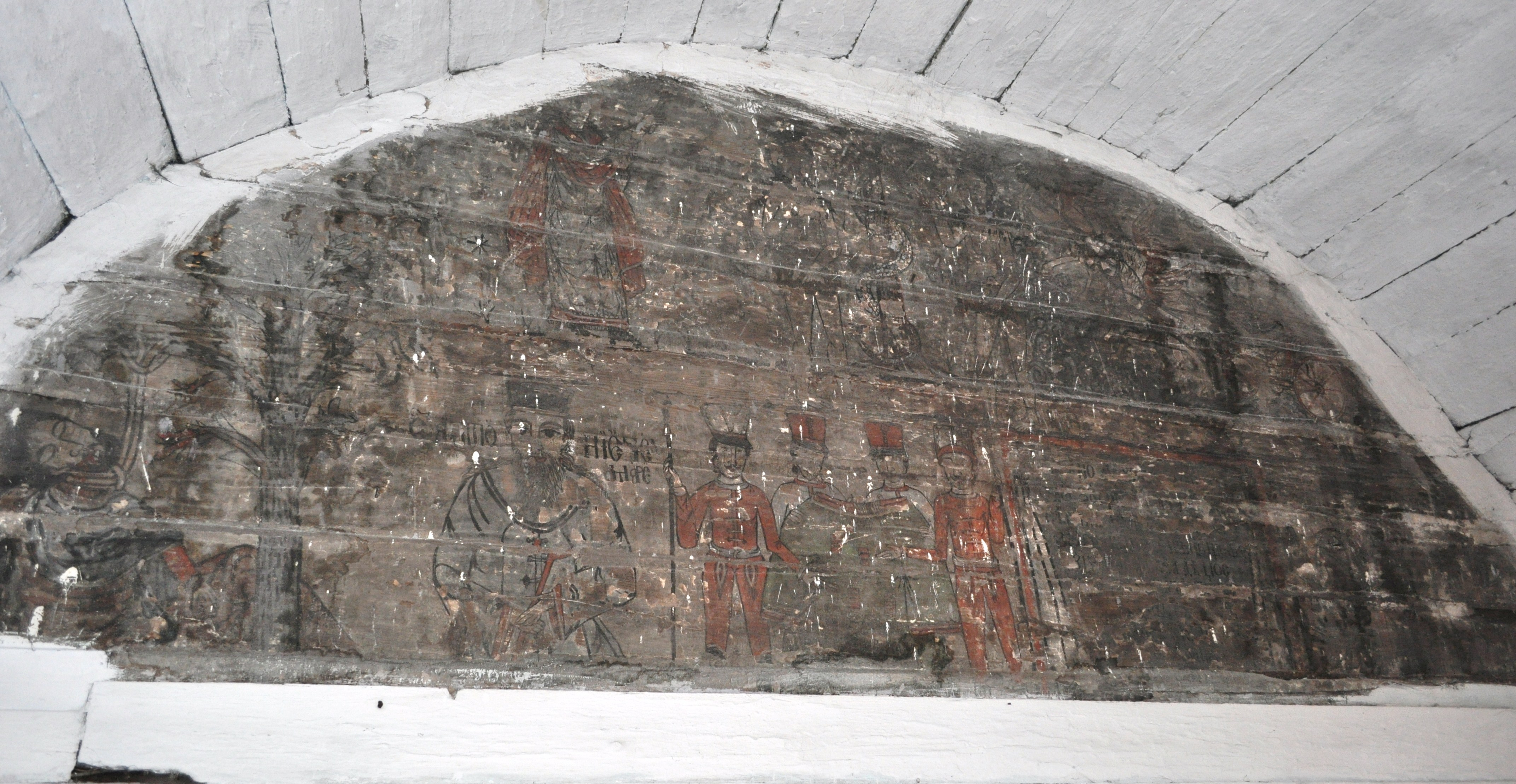 Biserica de lemn „Sfinții Arhangheli” din Surduc, județul Cluj